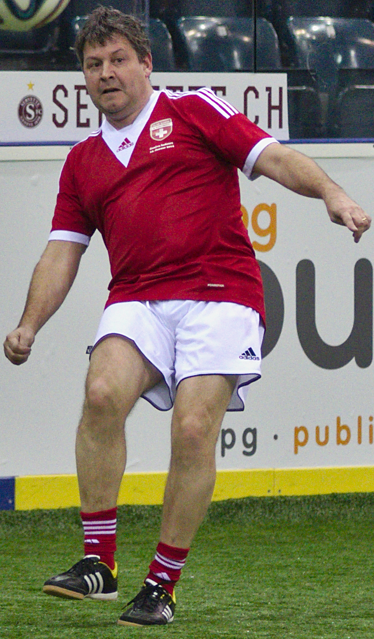 Genève Indoors 2014 - 20140114 - Aron Winter et Christophe Ohrel